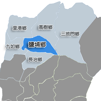 中文（台灣）: 屏東縣鹽埔鄉相對位置。